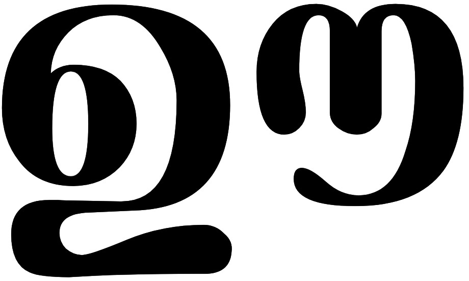 ഊ മലയാളം അക്ഷരം